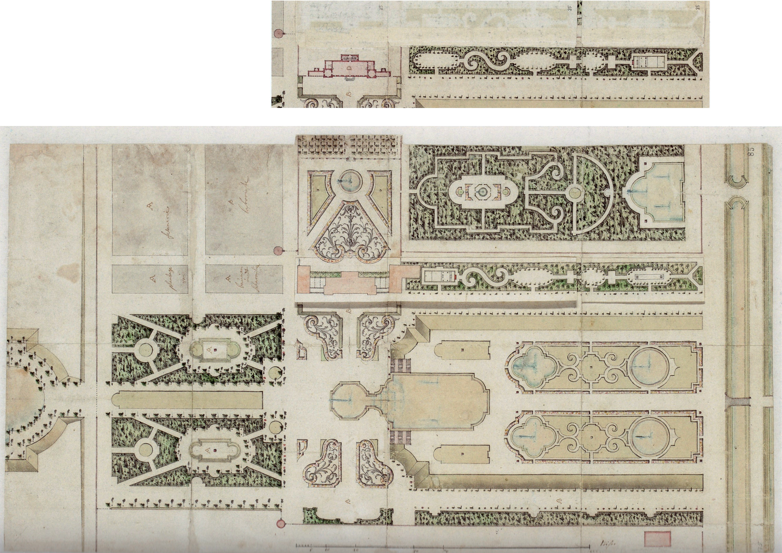 Plan des Westgartens von Schloss Nordkirchen